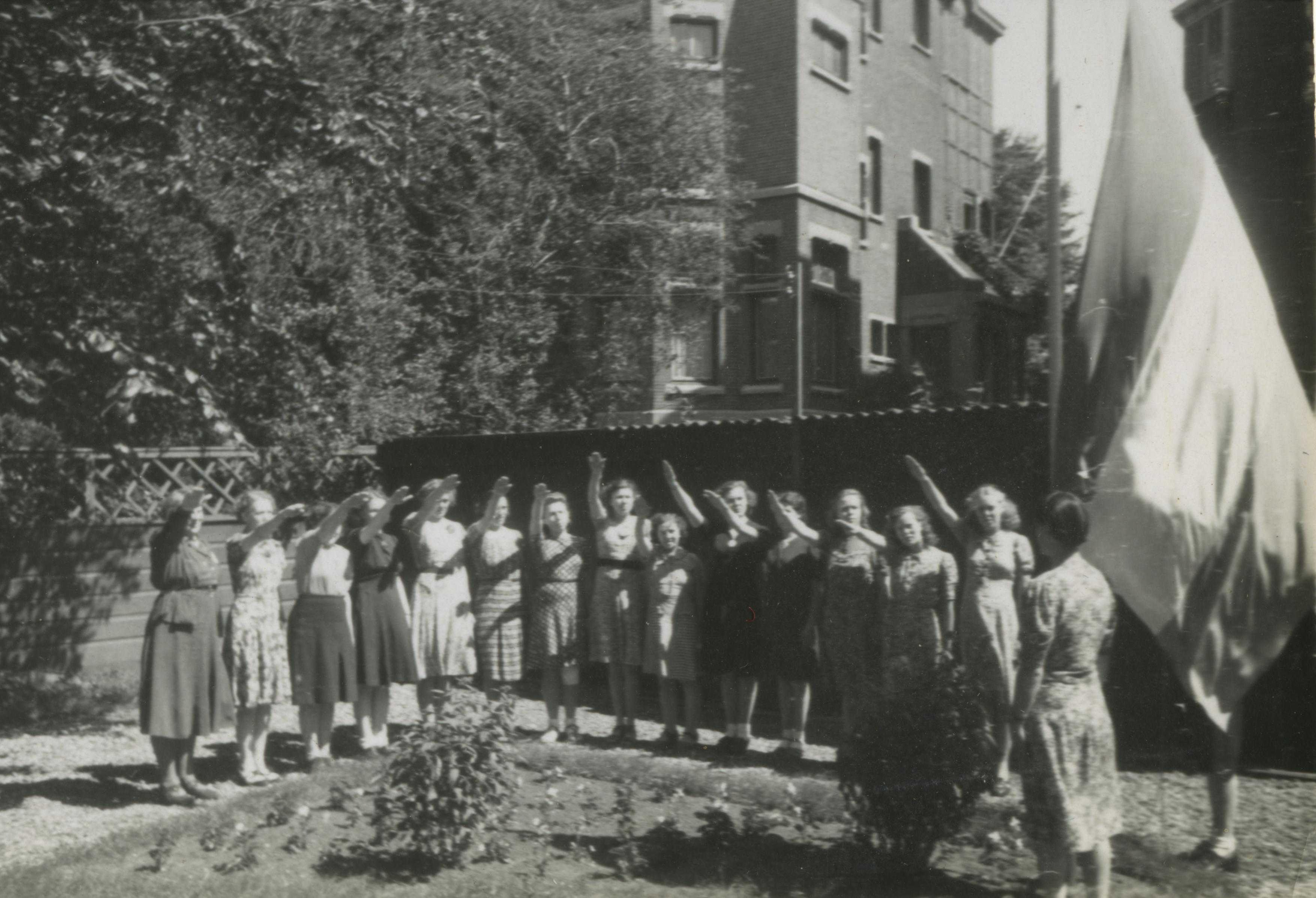 Serie over de Nationaal-Socialistische Vrouwen-Organisatie (NSVO): een cursus kinderverzorging in de Moederschool van de NSVO in de Paulus Potterstraat. De ( interne) cursus duurt 6 weken en is bedoeld voor meisjes die na de opleiding gaan helpen in gezinnen waar de de huisvrouw afwezig of hulpbehoevend is. Deze foto is afkomstig uit het archief van de Fotodienst der NSB.